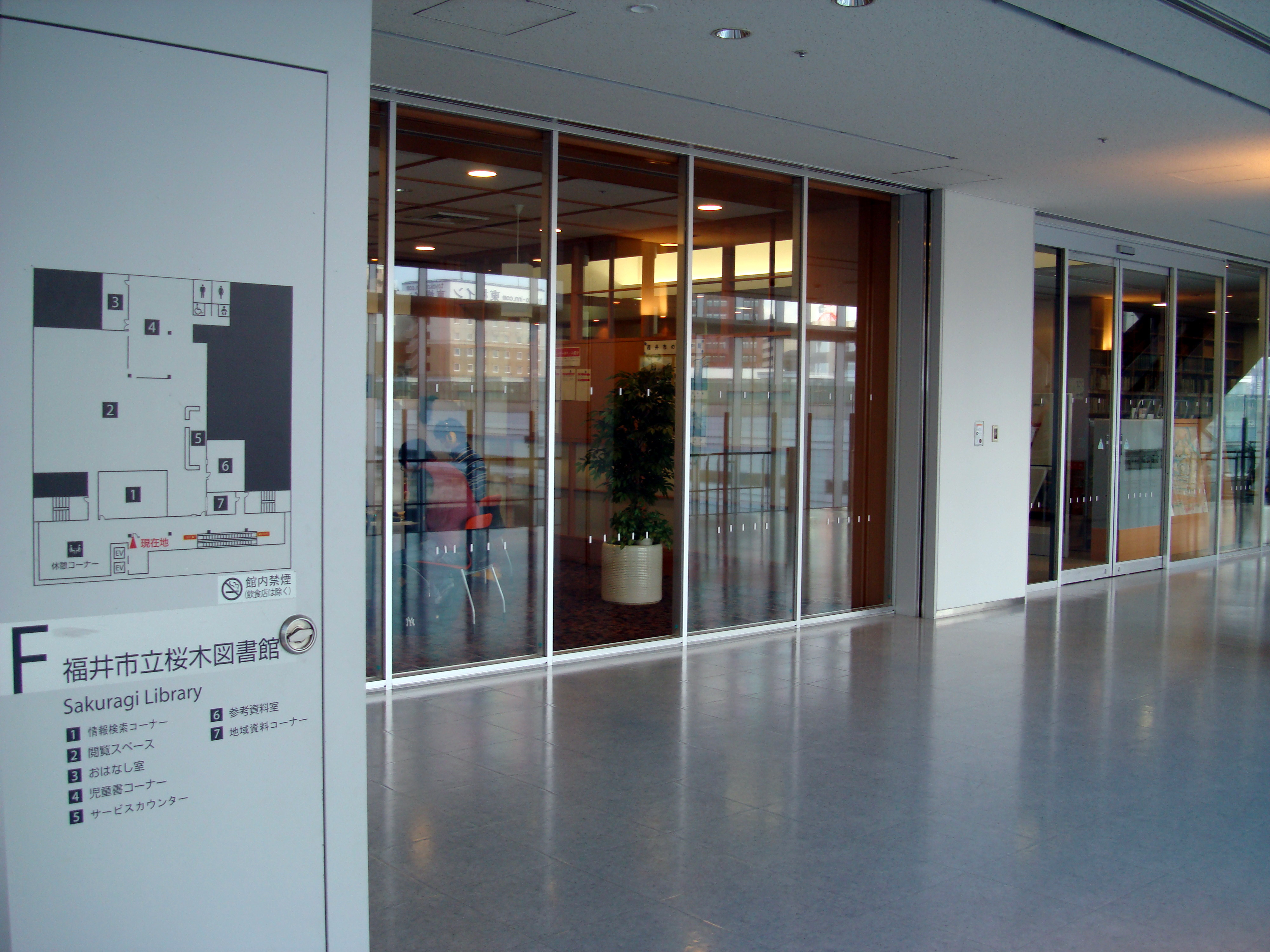 福井市立桜木図書館(AOSSA 4F)